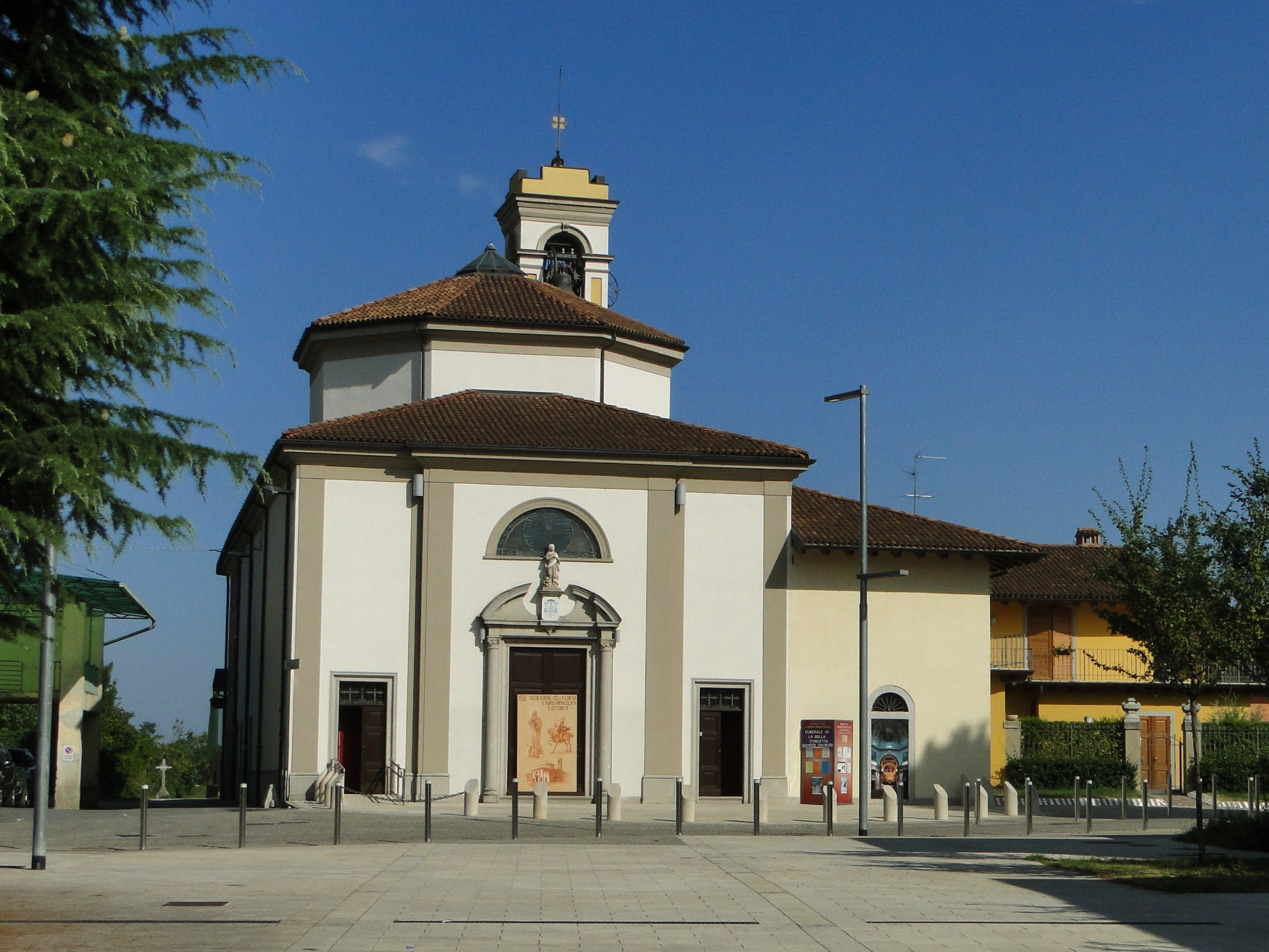 Grumello del Piano (Bergamo), chiesa di San Vittore e Maria Immacolata